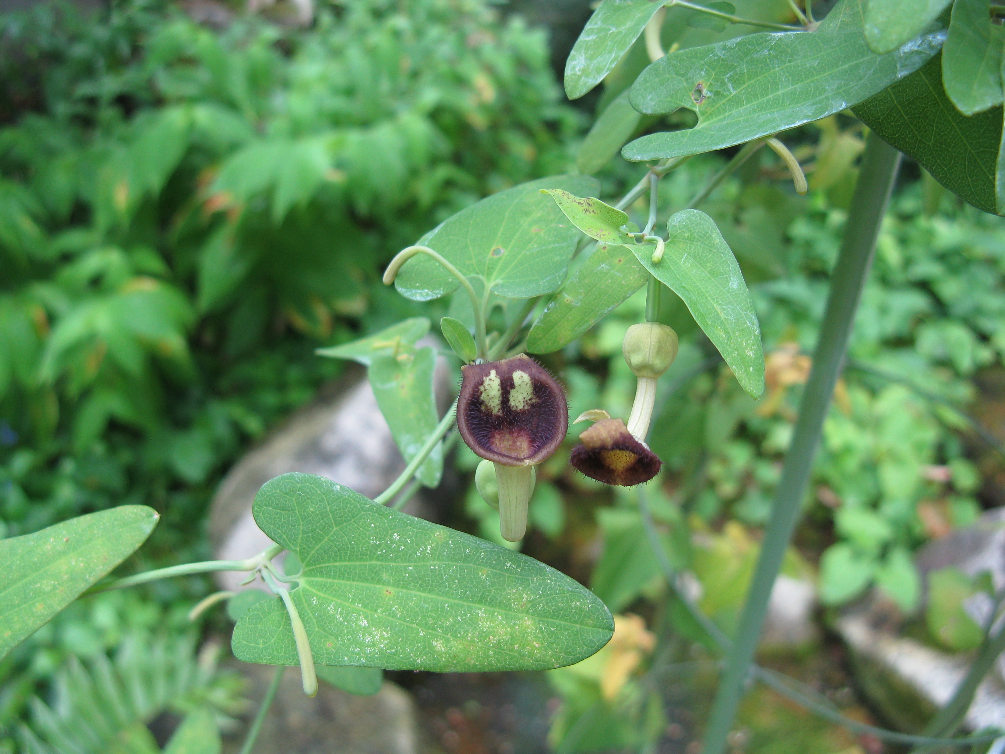 Scientific name Aristolochia debilis